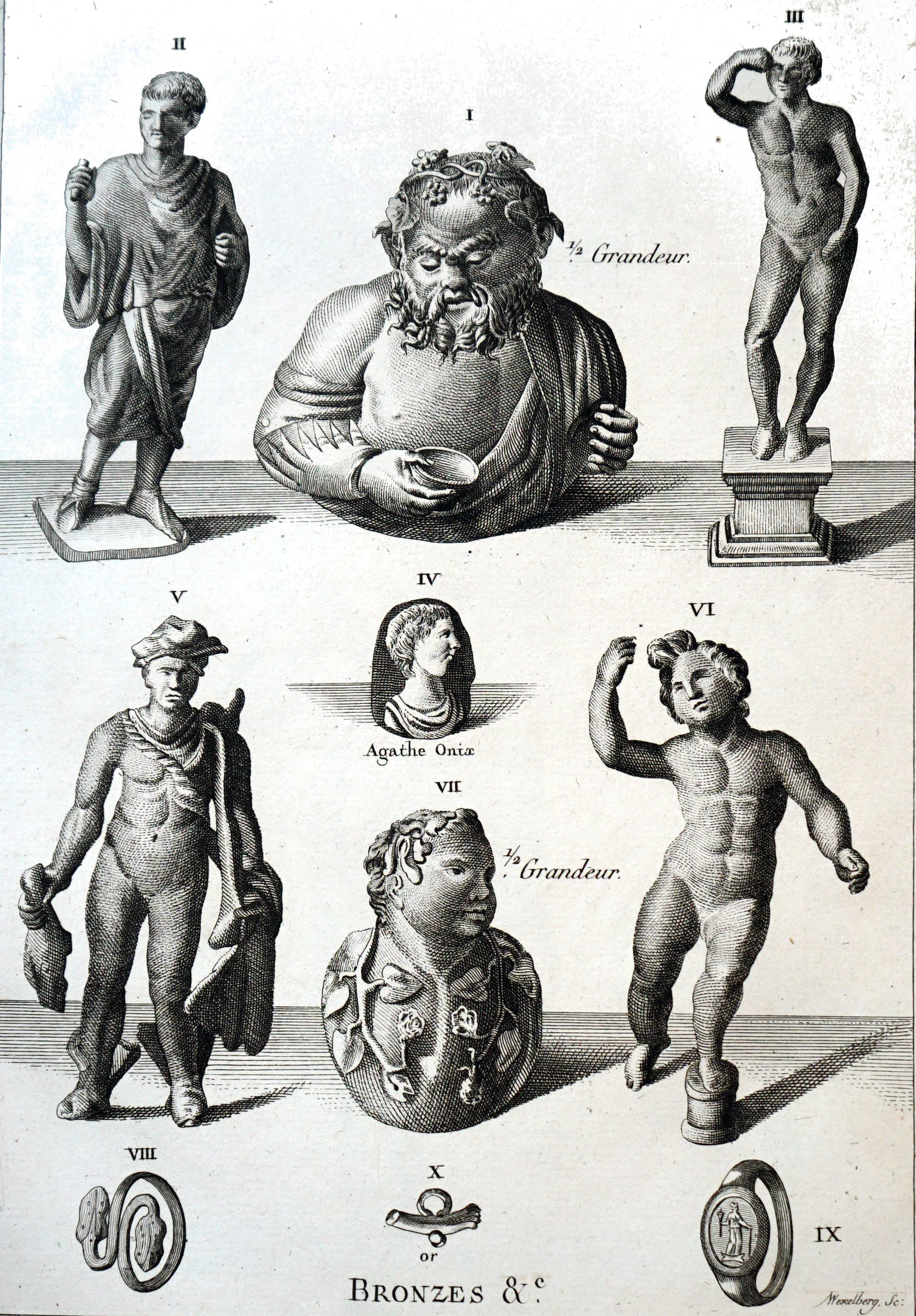 planche publiée dans le tome III.